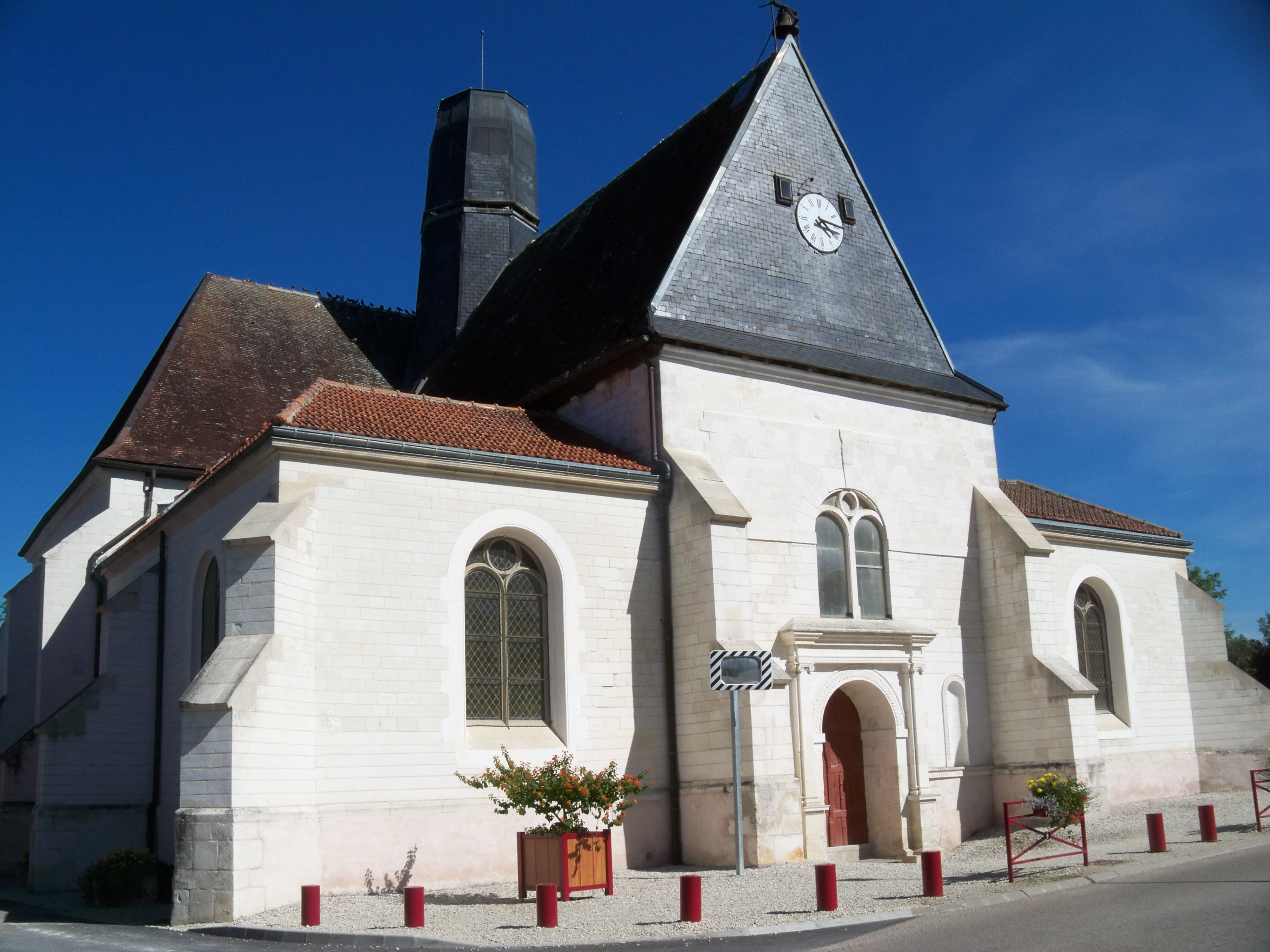 L'église Saint-Léger, monument de culte classé par arrêté du 14 mai 1980. .